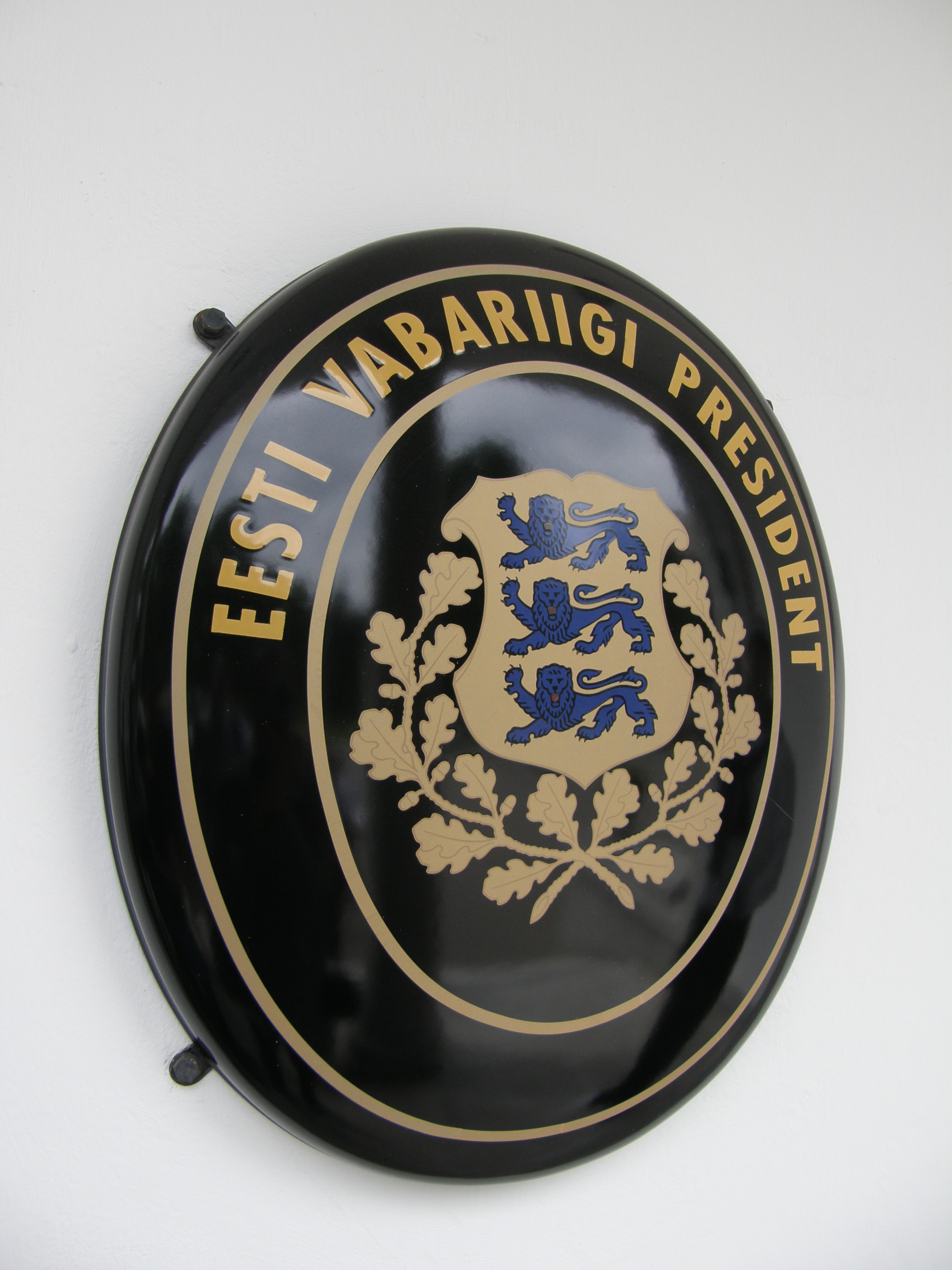 Presidendi kantselei uksel olev silt.